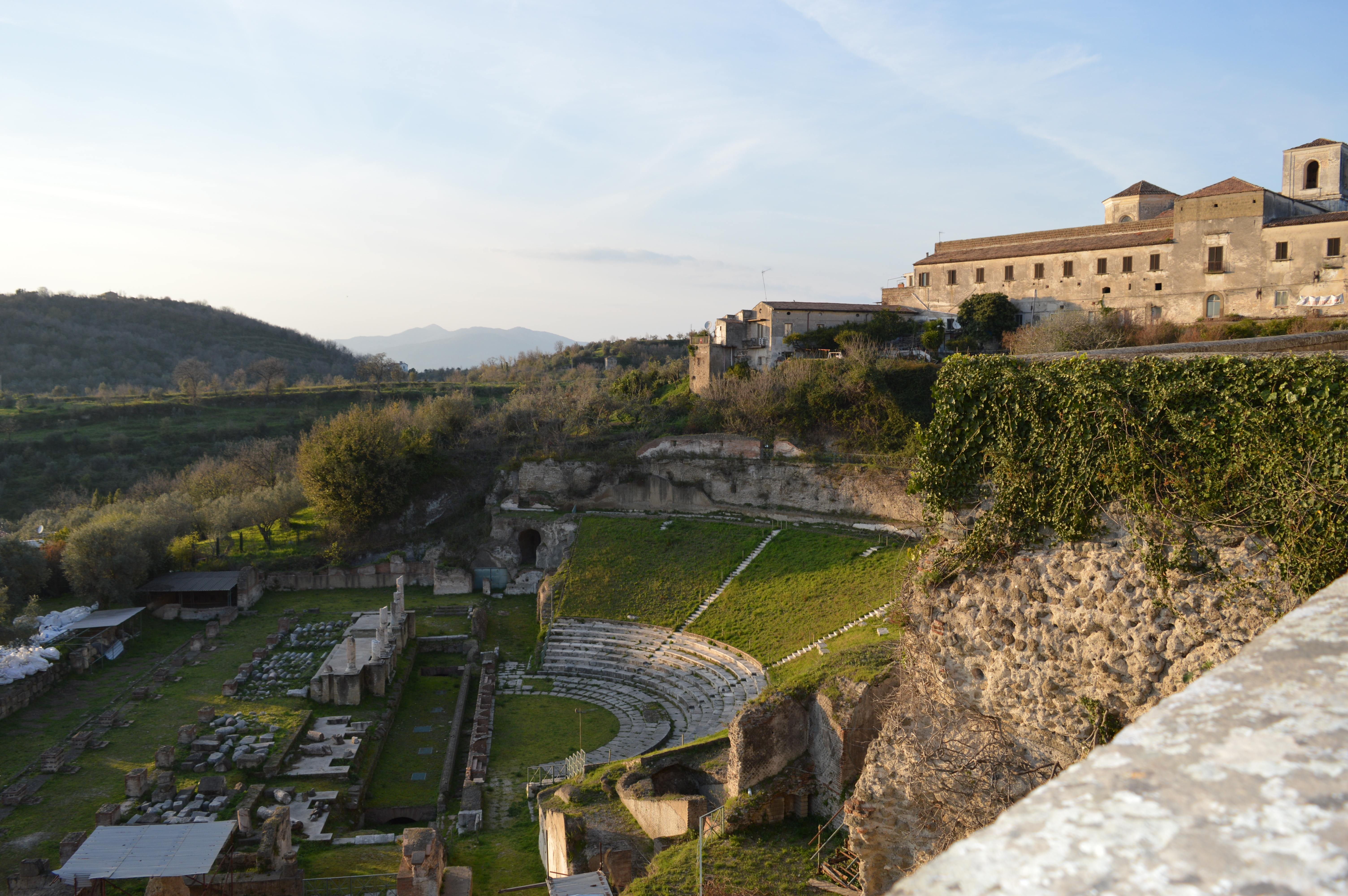 iuuuuuuu